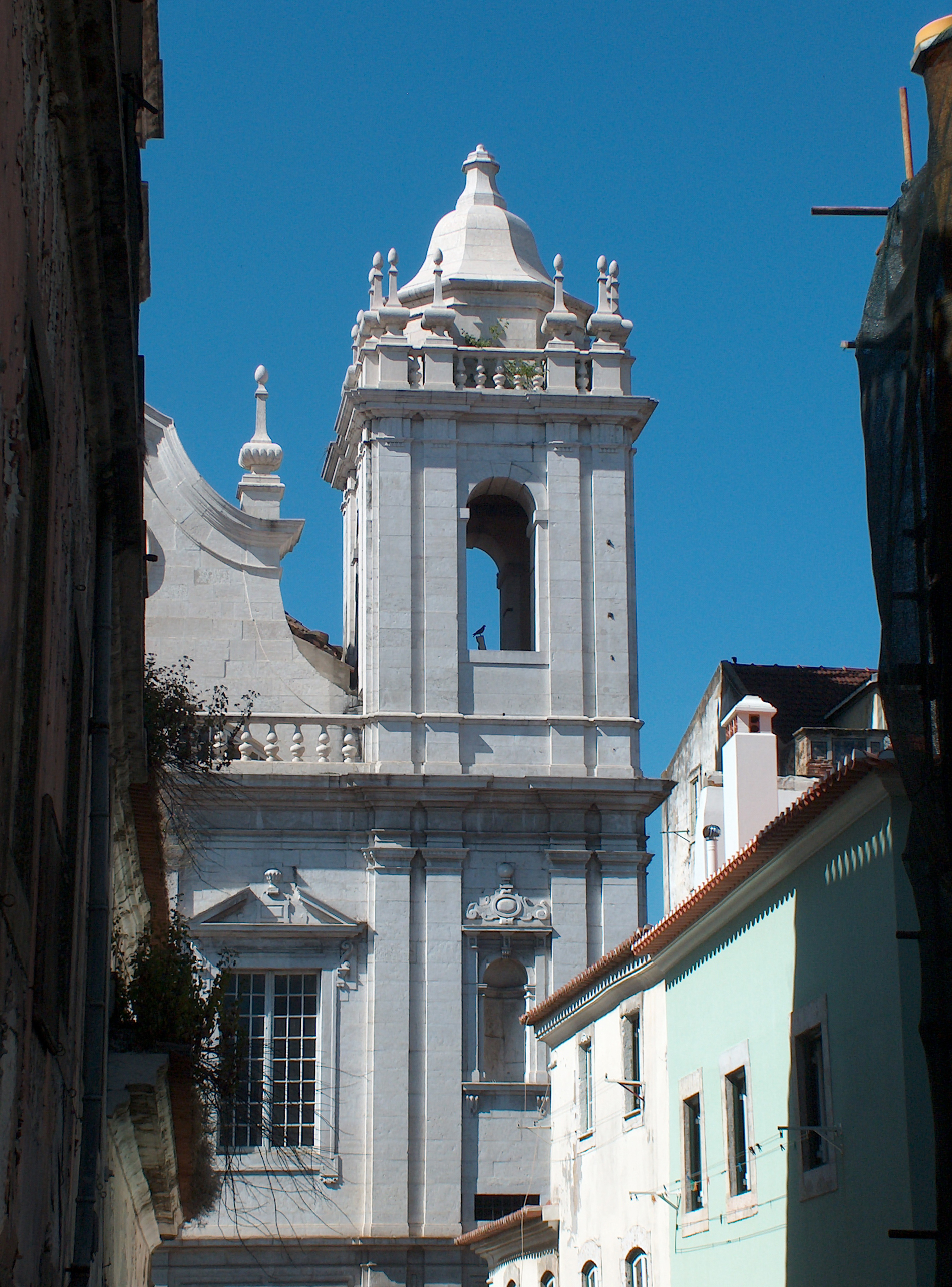 Igreja de Santa Catarina em Lisboa